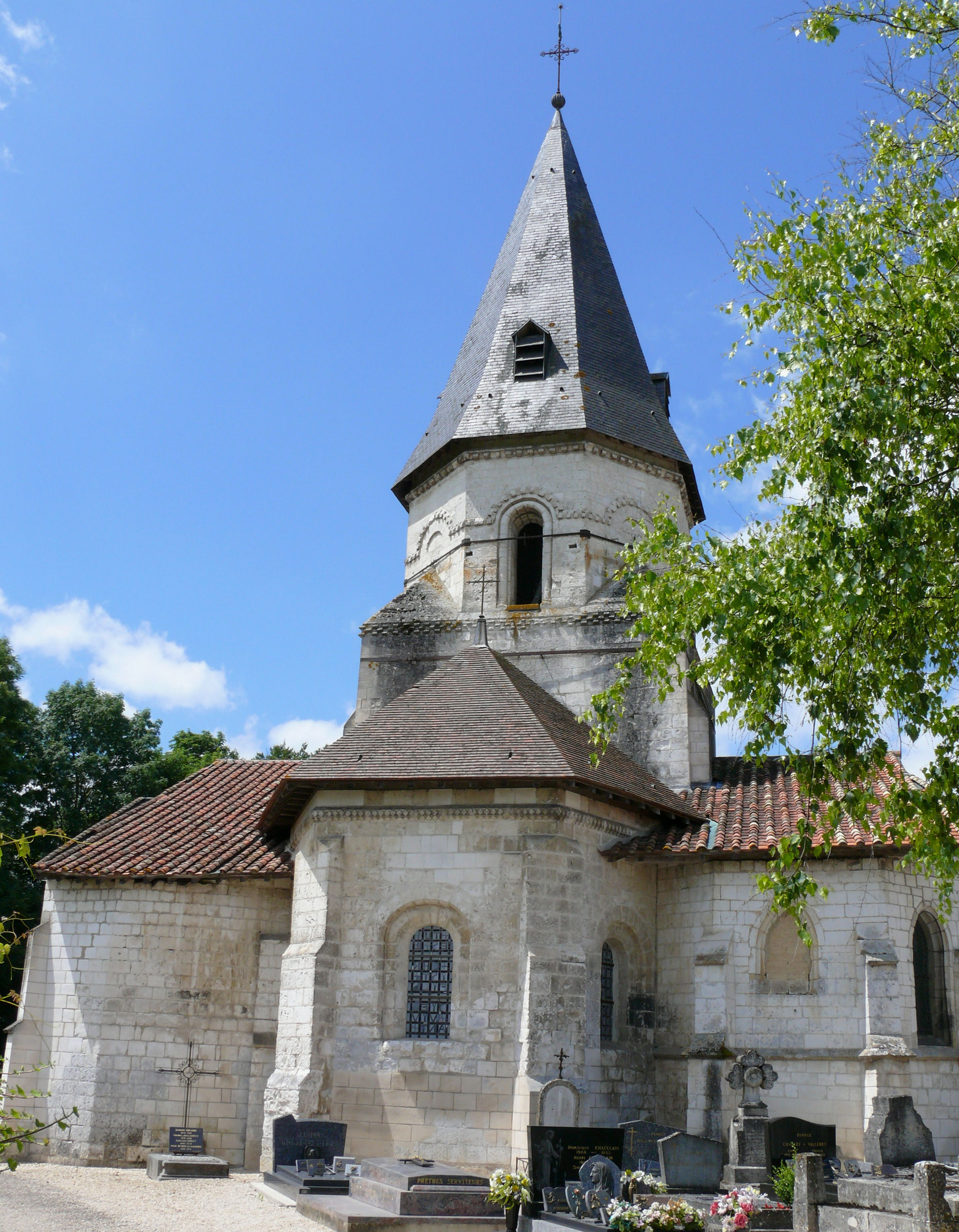 La Chaussée-sur-Marne - Coulmiers - Eglise Saint-Pierre-ès-Liens